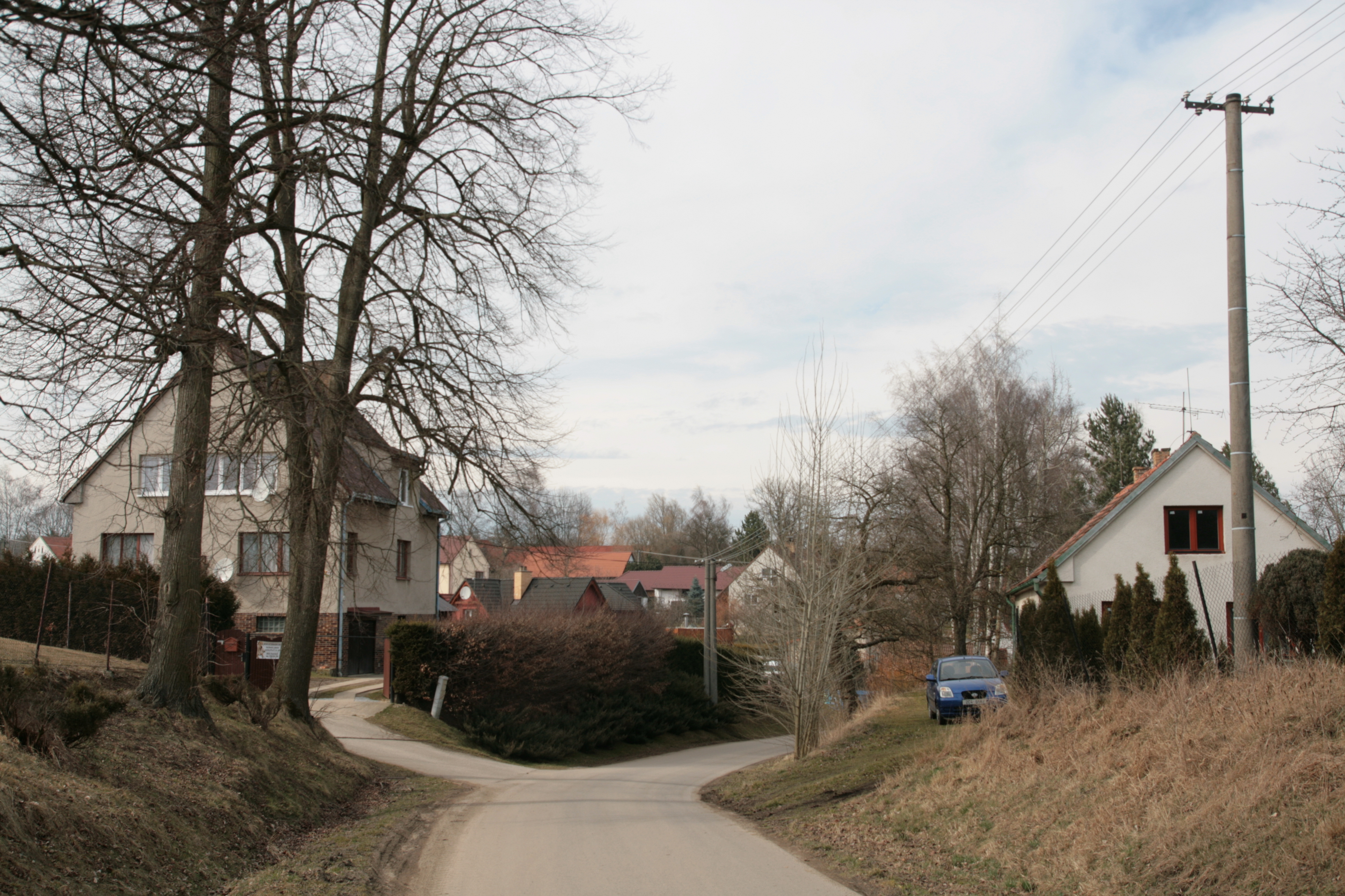 Vesnice Ohrazení, část obce Ledenice v okrese České Budějovice. Průhled přístupovou cestou od jihu, vlevo dům č. 42, vpravo dům č. 4.